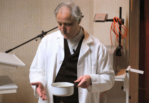 Hervé This, chimiste inventeur de la gastronomie moléculaire.